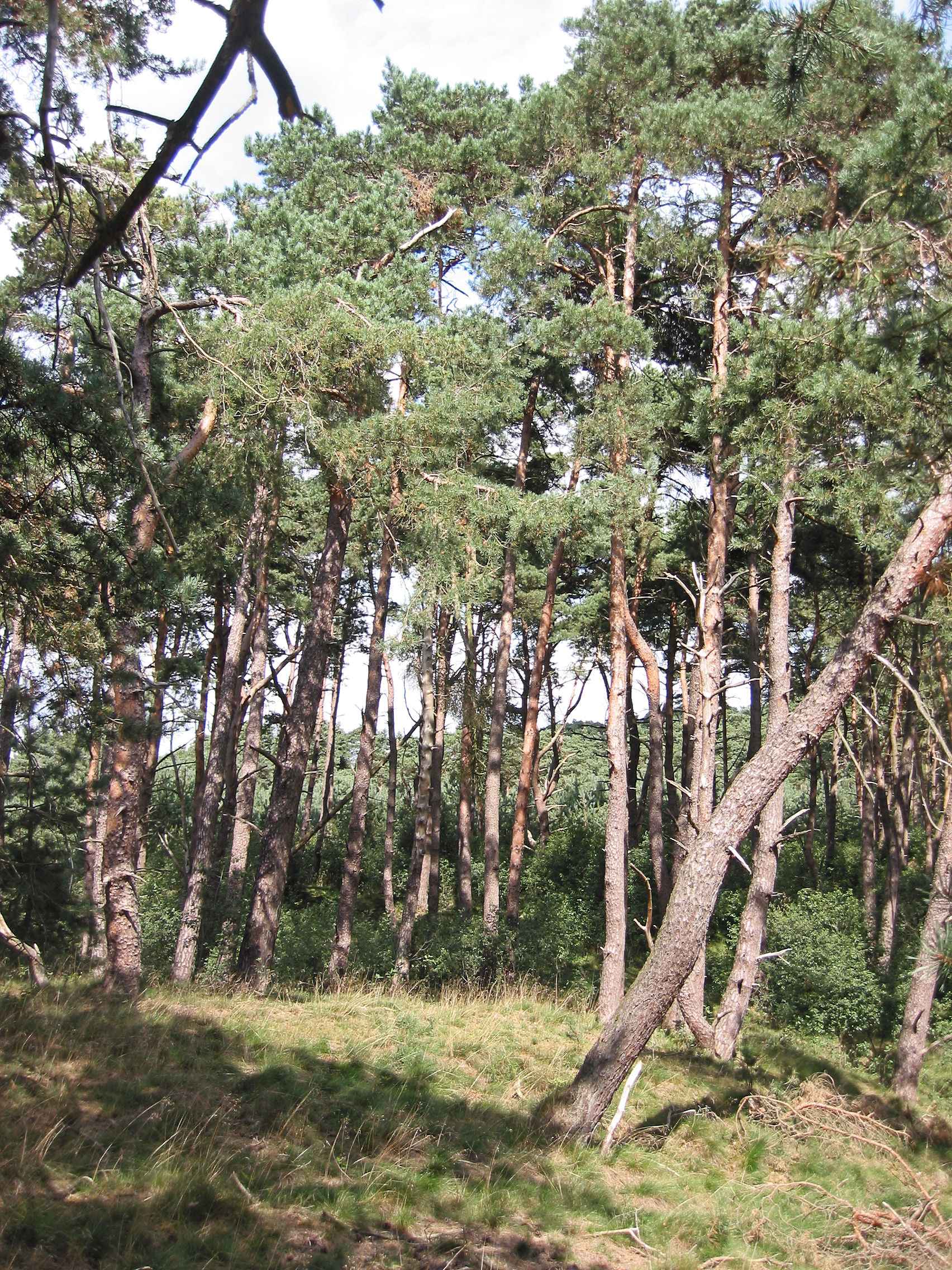 Wekeromse Zand Grove den (Pinus sylvestris)